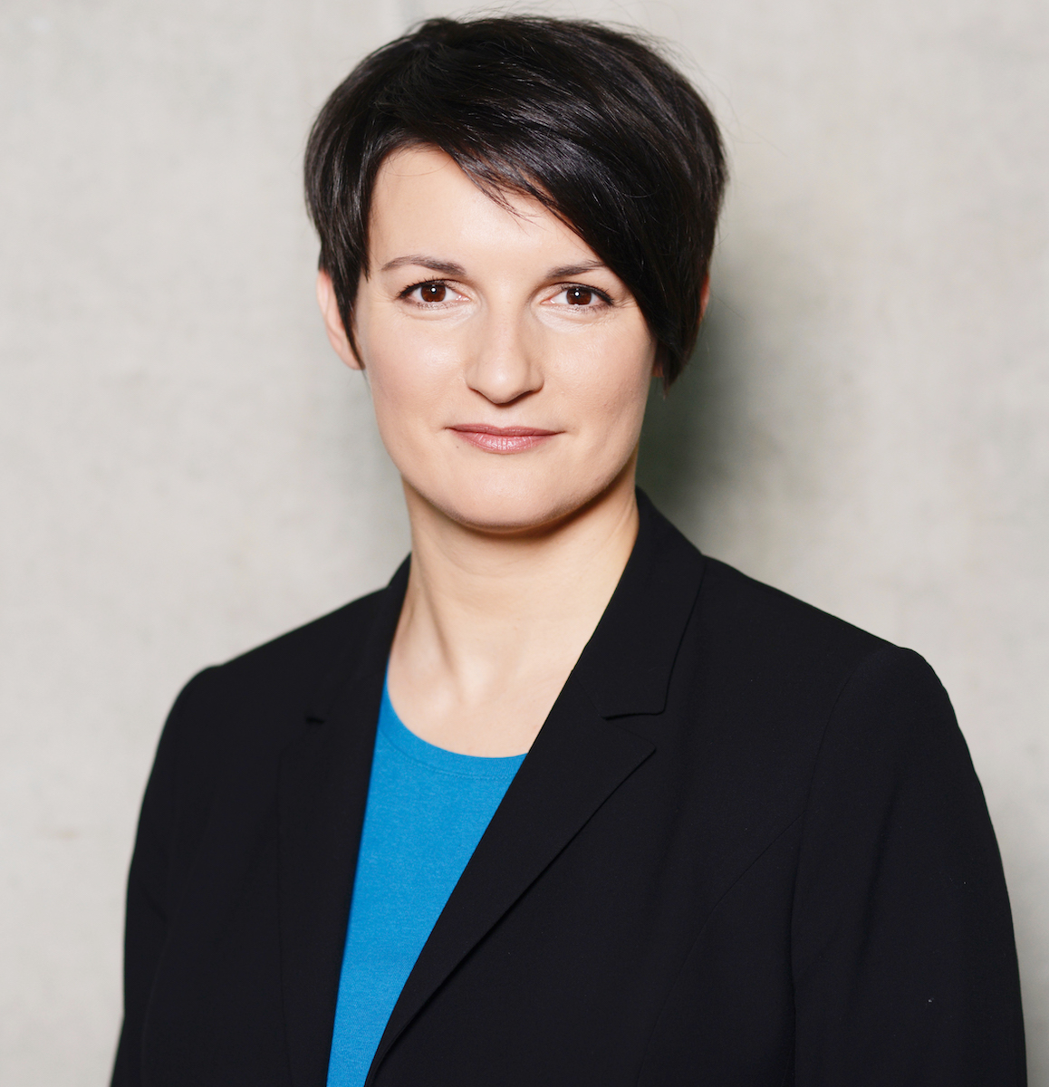 Irene Mihalic. Foto: Stefan Kaminski